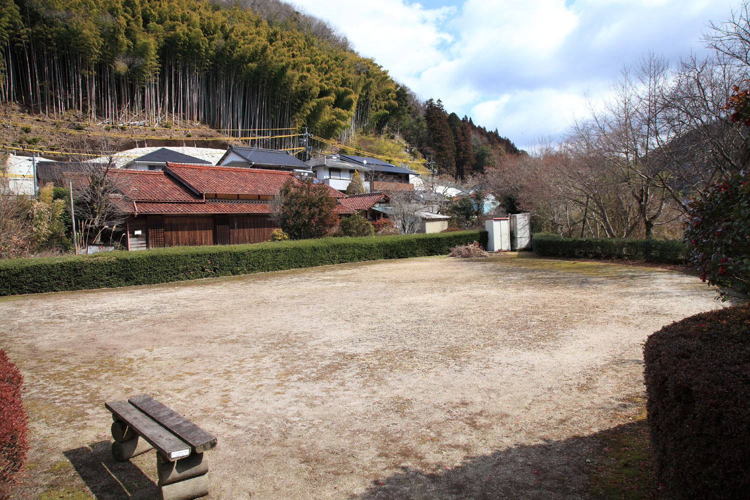 今朝平遺跡（豊田市足助町、2012年）